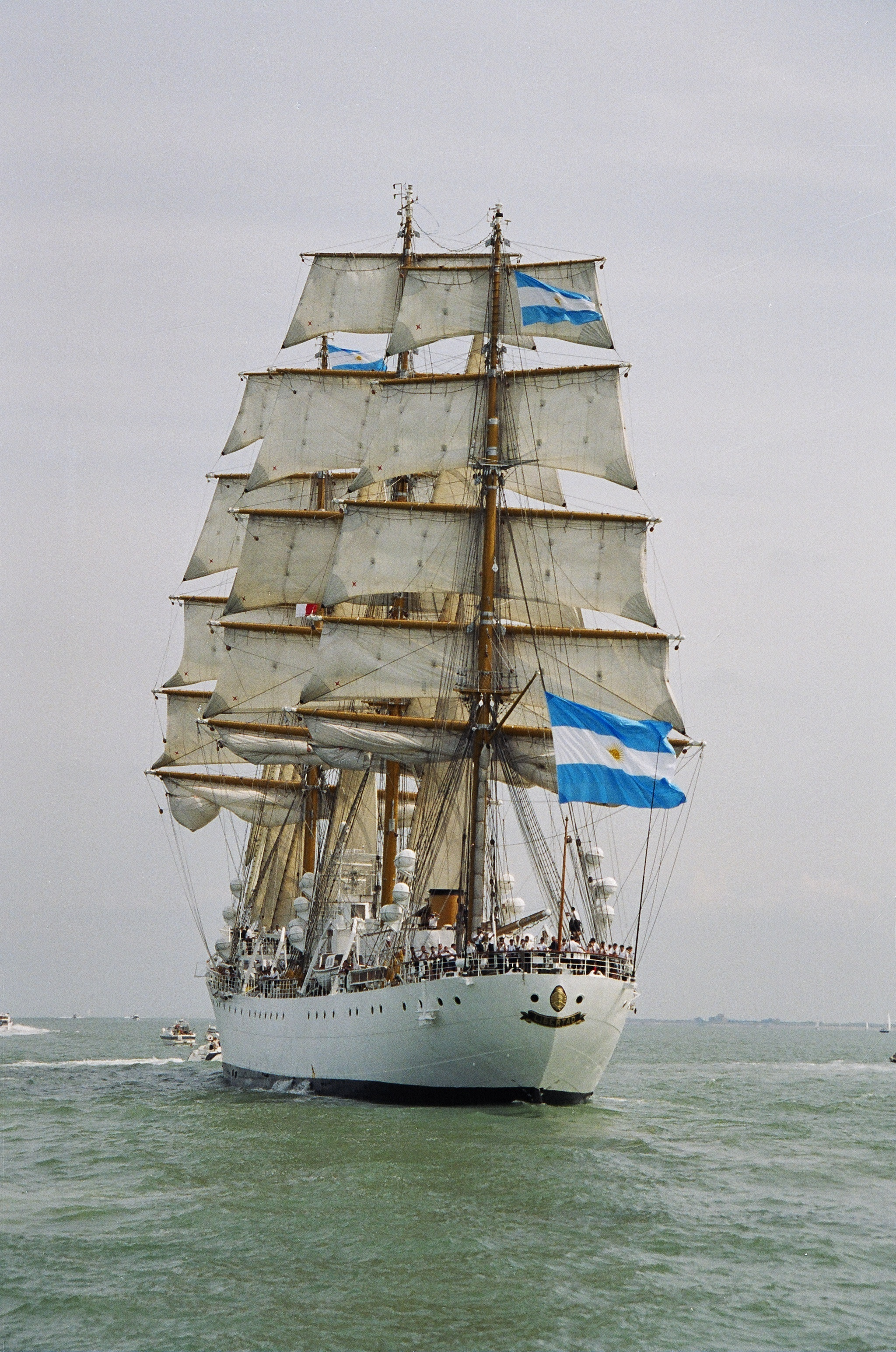 Fragata ARA Libertad